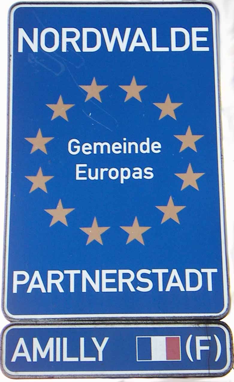 Verkehrsschild (Städtepartnerschaft) am Ortseingang von Nordwalde (Kreis Steinfurt)